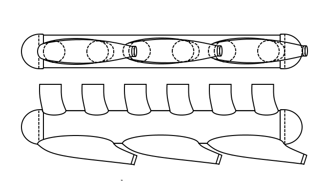 Trippelavgasrekylator